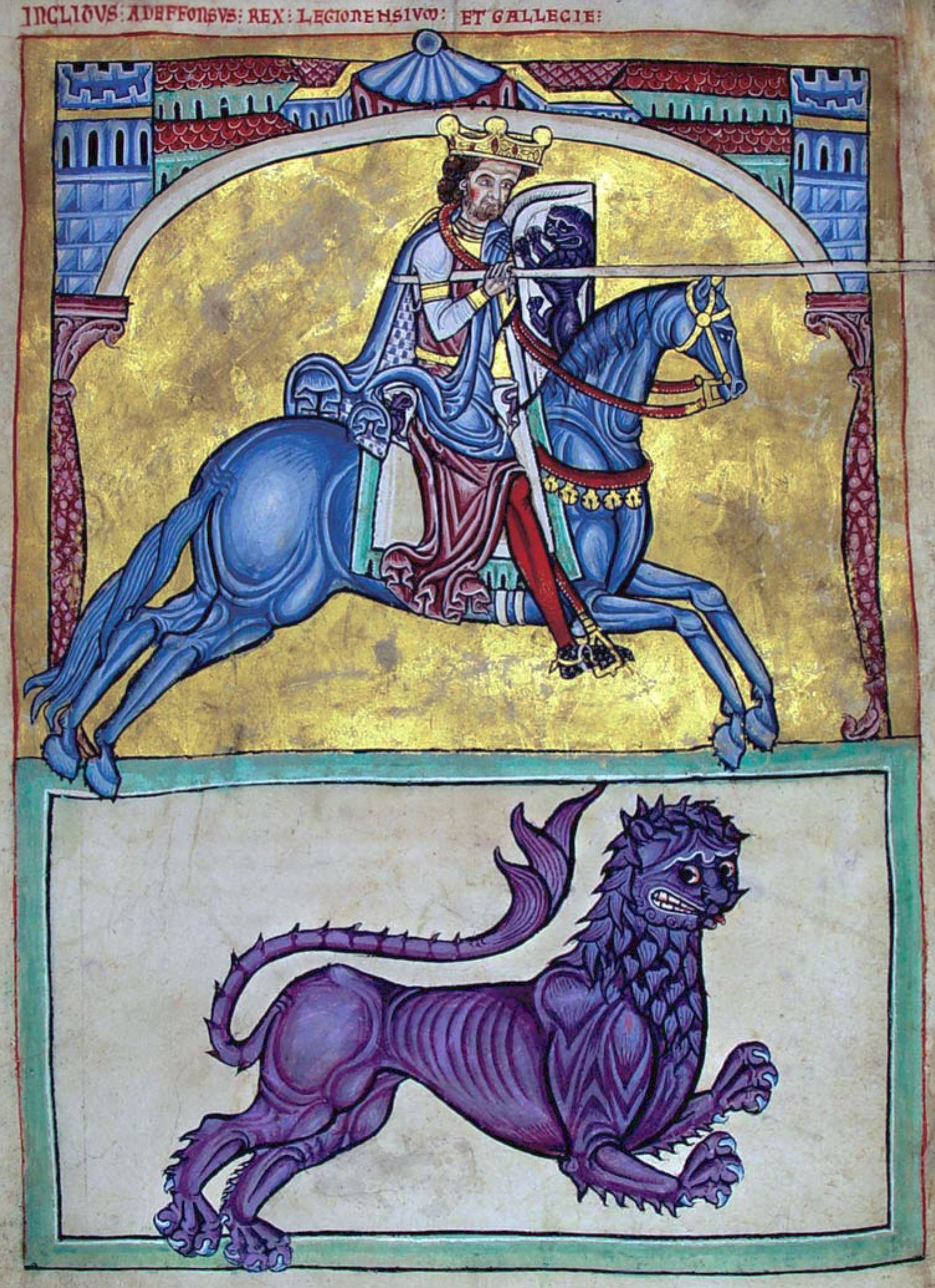 Afonso VIII, rei "Legionensium et Gallecie" (rei dos leoneses e Galicia) nunha miniatura do Tumbo A. Catedral de Santiago. Século XIII.